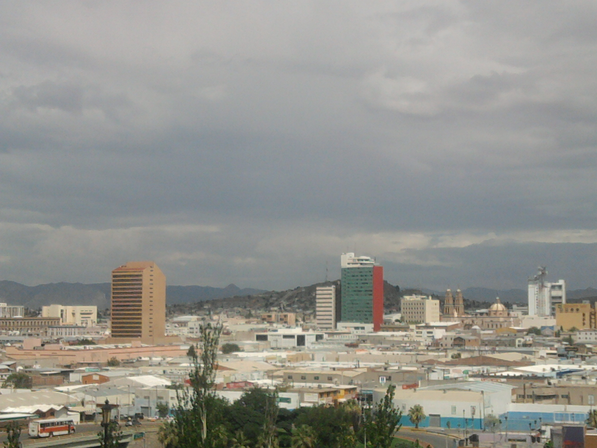 skyline de chihuahua visto desde el palomar